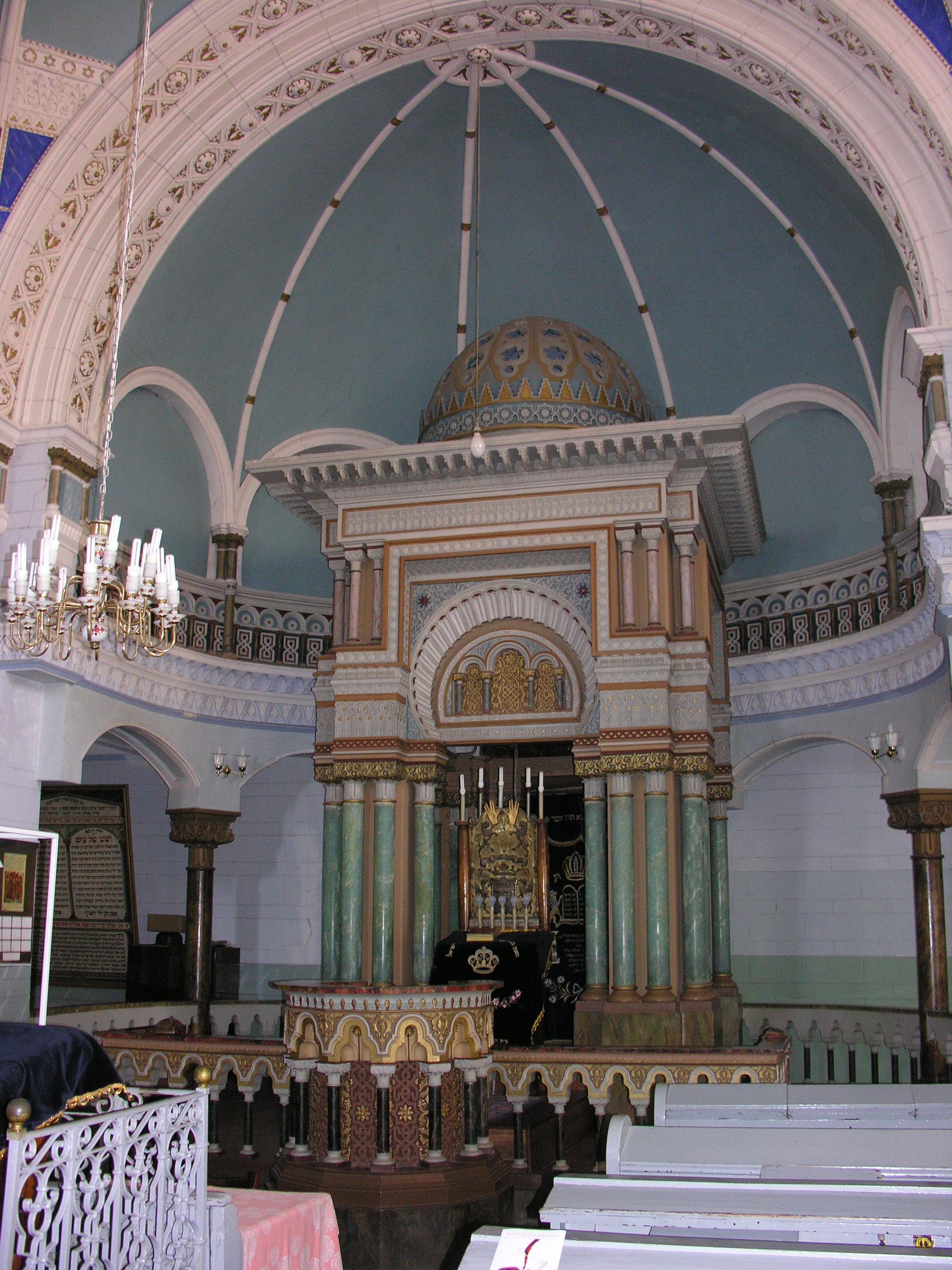 Wnętrze synagogi